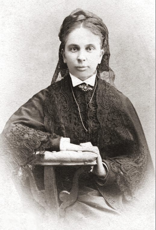 Антаніна Пятроўна Роланд (фон Фетынг)